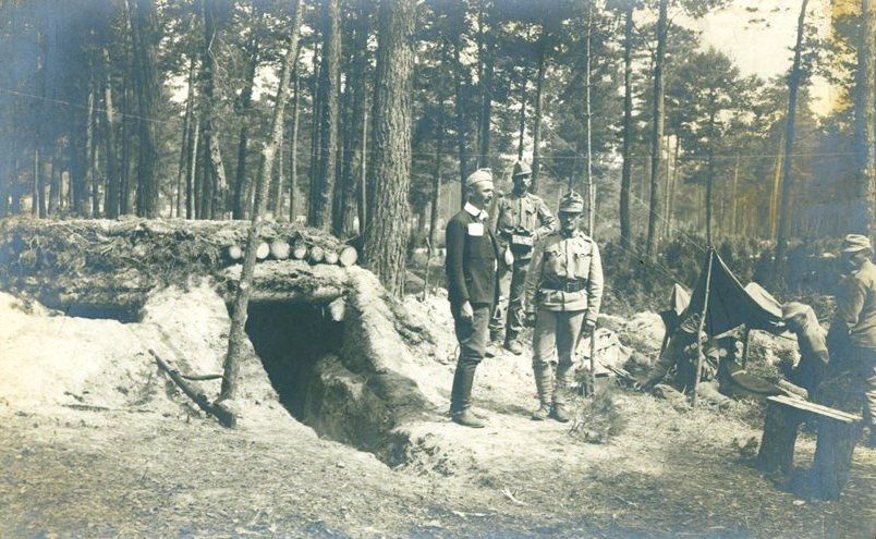 Снимка на австро-унгарски войници край скривалище (землянка).